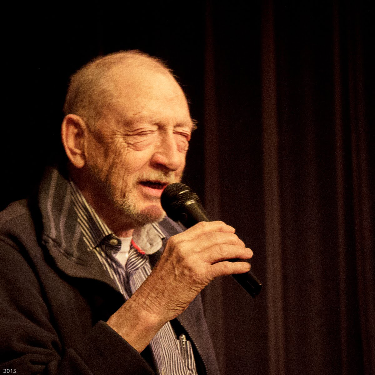 Cees Schrama